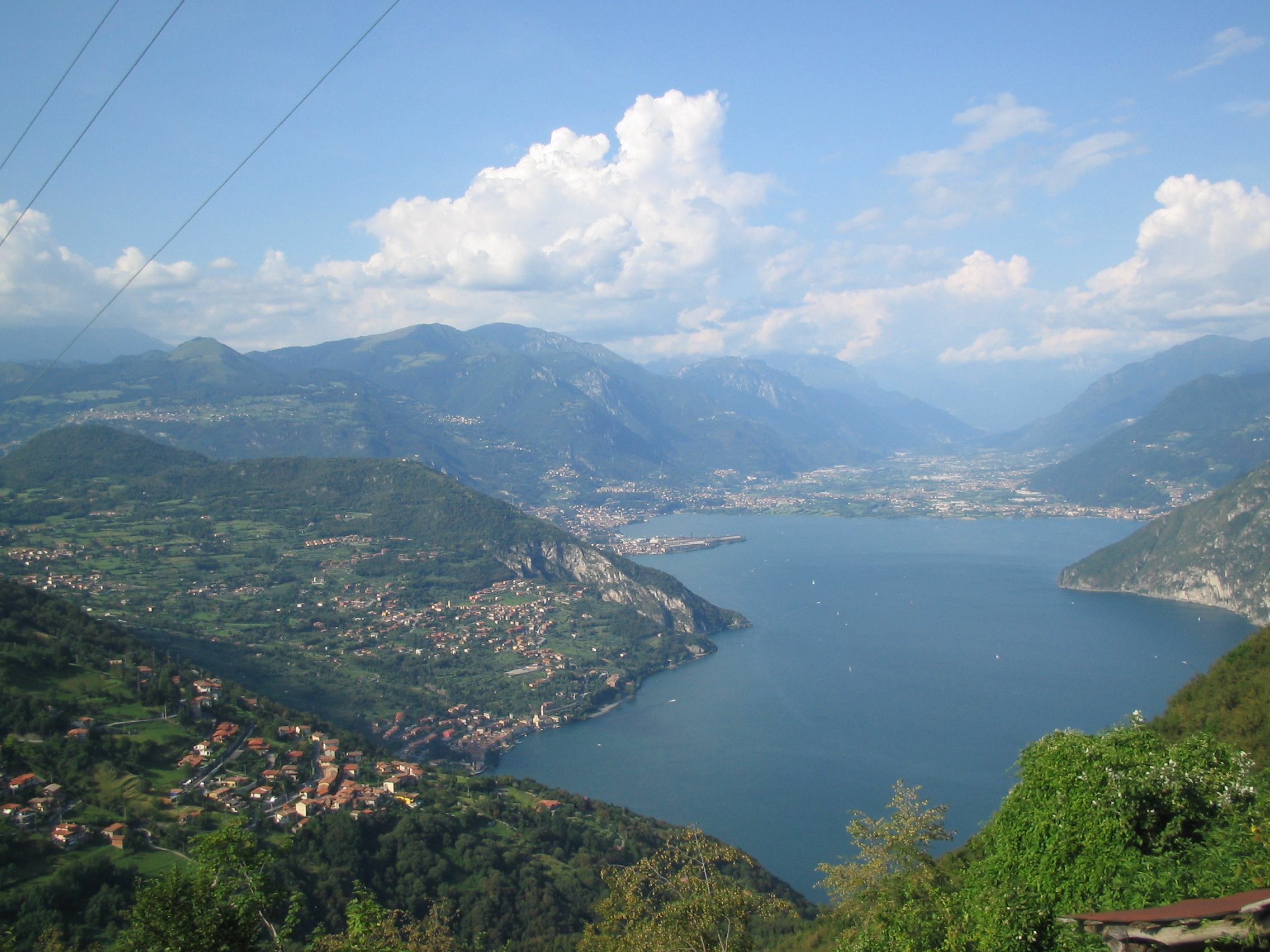 Lago d'Iseo, Orobie.